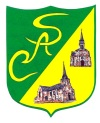 Logo Salle et Chapelle Aubry